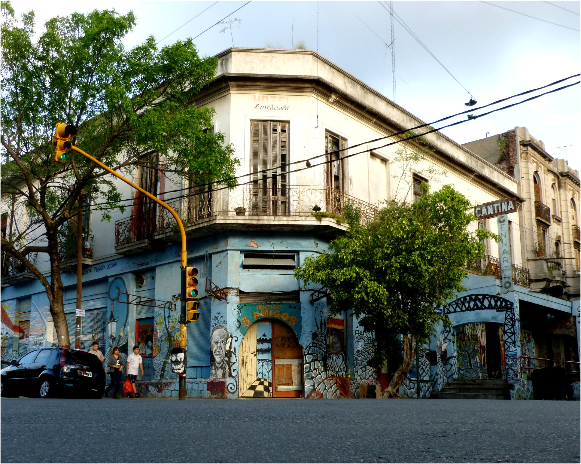 Suárez & Necochea, corner of La Boca, Buenos Aires, Argentina. One of the places related with the origins of tango. Suárez y Necochea. Esquina de La Boca, Buenos Aires, Argentina. Uno de los lugares asociados con los orígenes del tango.